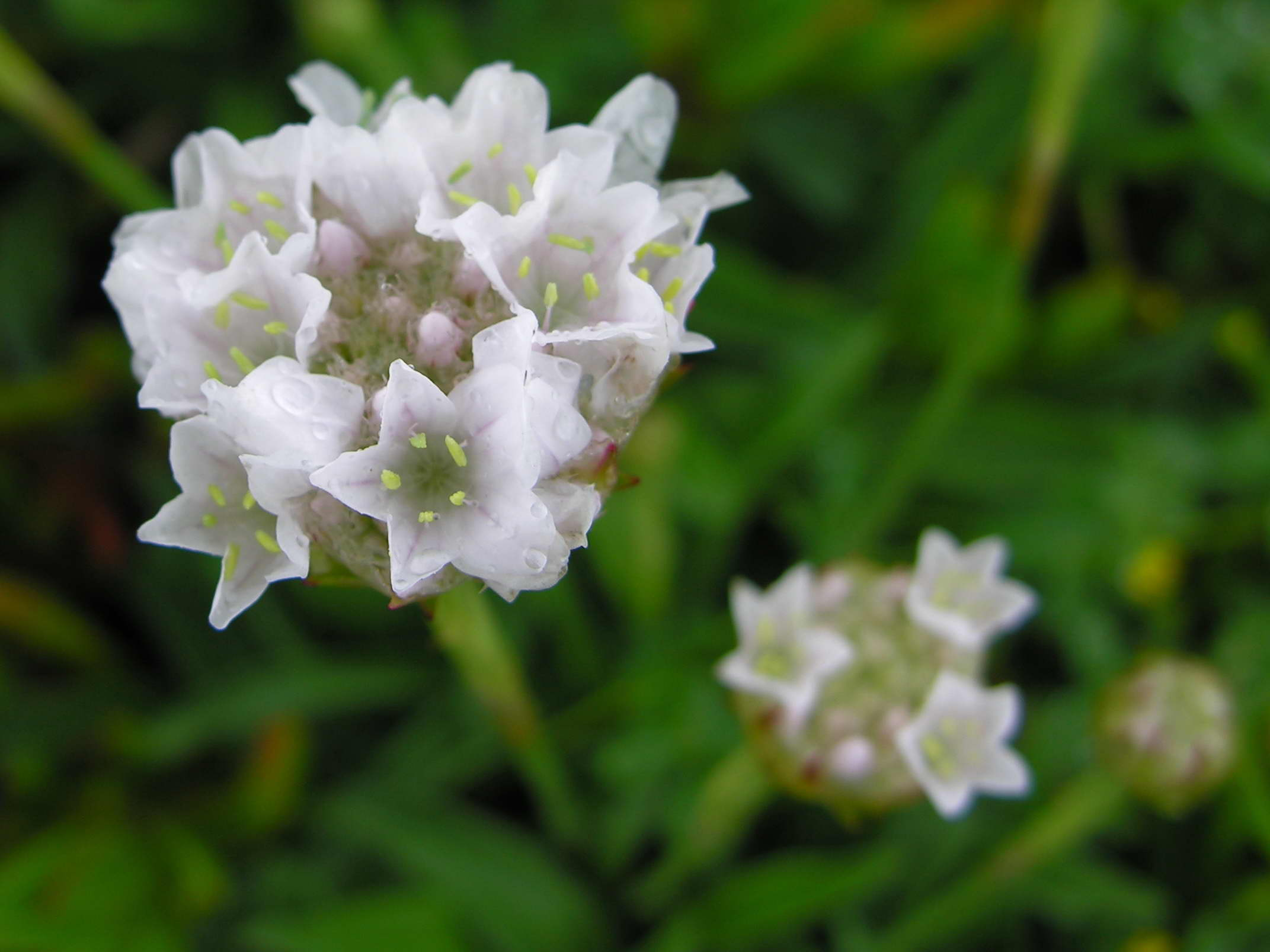 Armeria sp. Cabo da Roca (Sintra, Portugal) Publish by= Luis Miguel Bugallo Sánchez. Self made